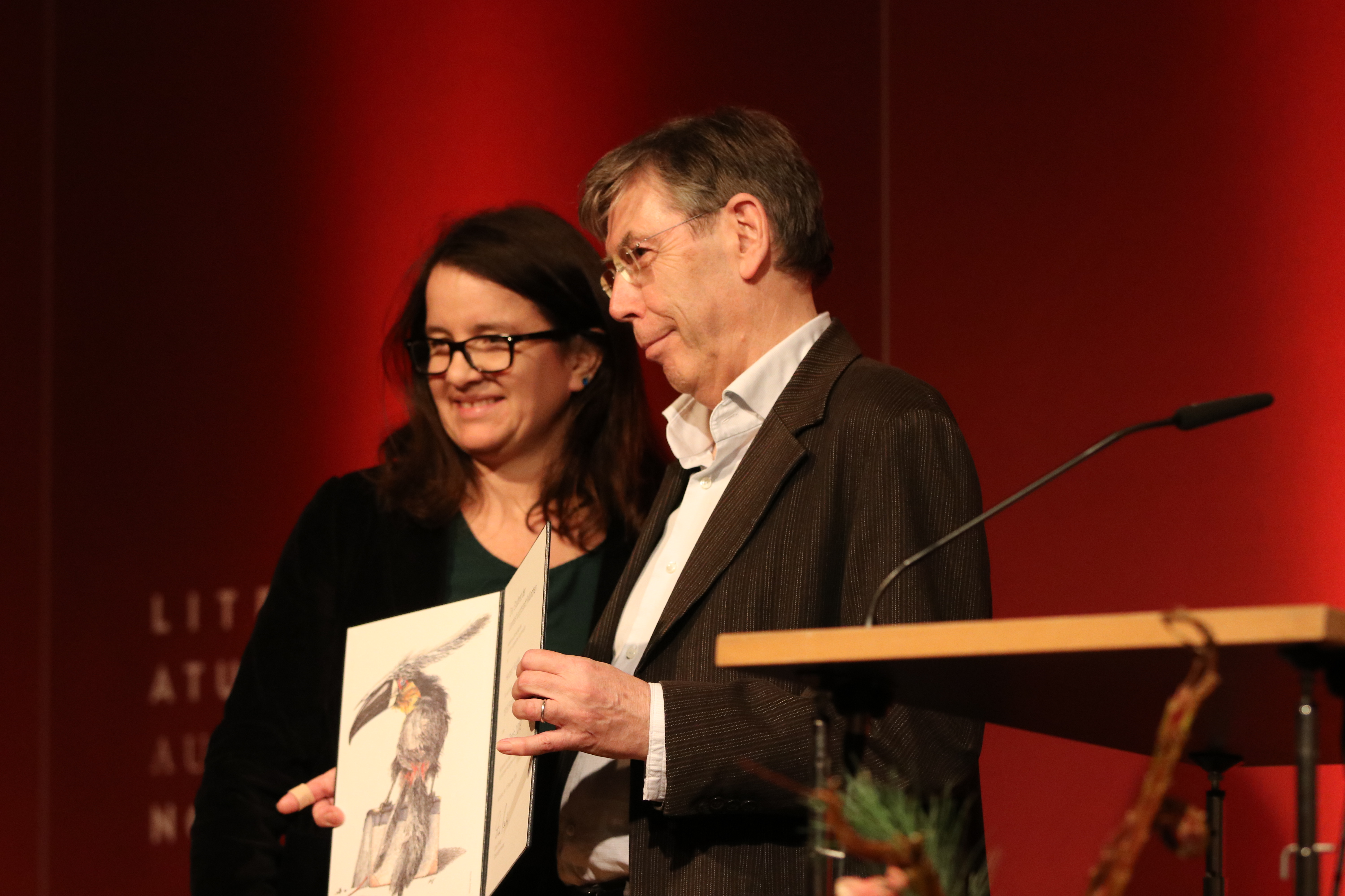 Verleihung des Tukan-Preises 2019 an Herbert Kapfer für sein Buch "1919. Fiktion". Der Preis wurde von Stadträtin Kathrin Abele im Literaturhaus München übergeben.